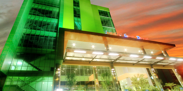 RSUD Dr. Saiful Anwar di Kota Malang